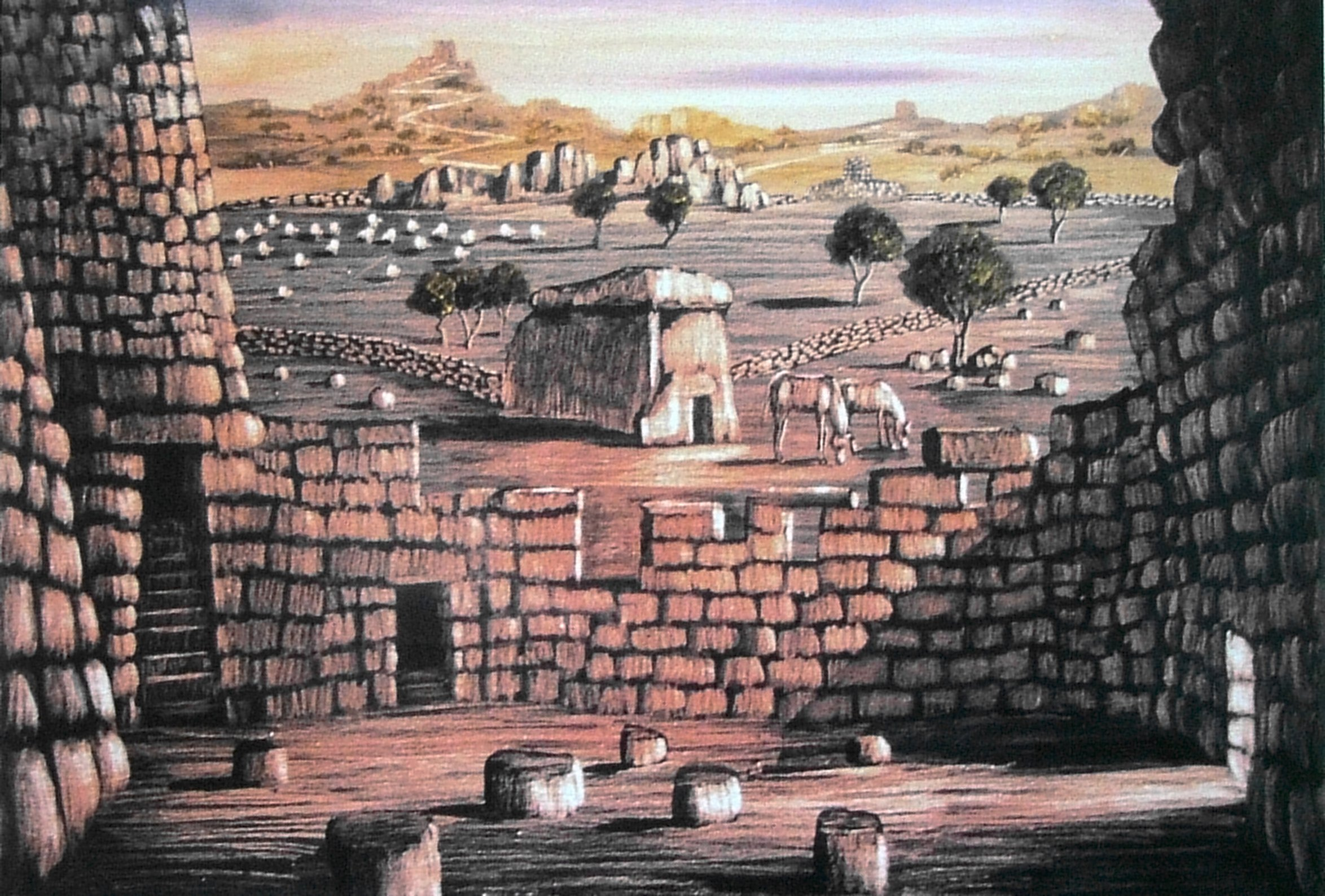 Questo quadro realizzatto dal Pittore Giovnni Seu, rappresenta il dolmen Sa Covecada, Che si trova in agro di Mores, la prospettiva di questa e Opera Vista dall'interno di un Nuraghe semidistrutto, questa è una delle tante idealizzazioni dall'artista in Merito alla Civiltà Nuragica.